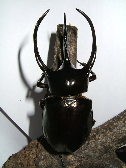 コーカサスオオカブトムシの写真